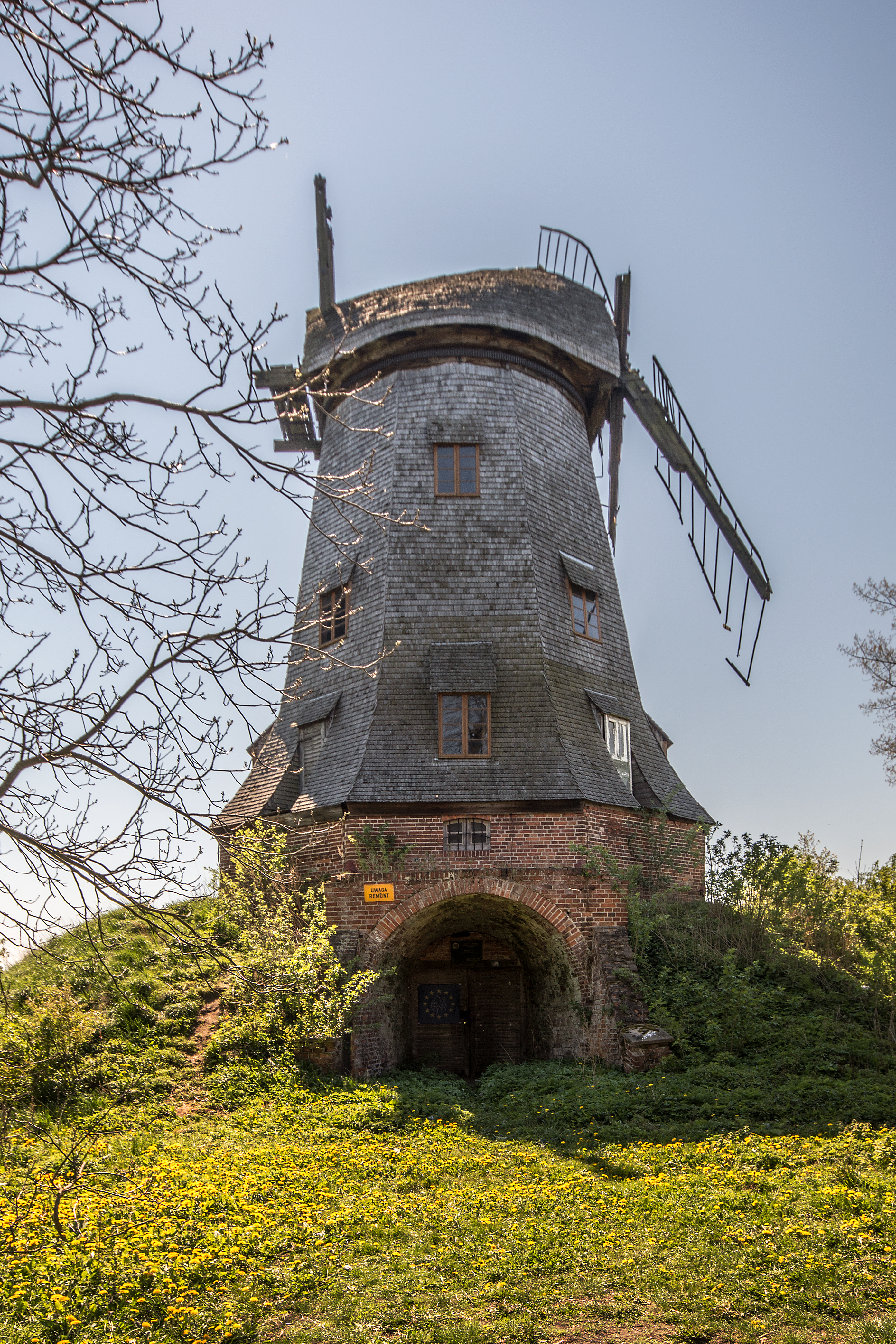 Palczewo, wiatrak holender, XIX